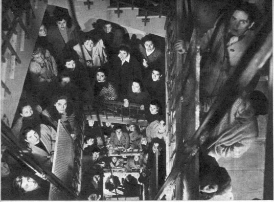 Foto di scena di Roma ore 11, regia di Giuseppe De Santis (1952). Dalla rivista Cinema Nuova serie, quindicinale di divulgazione cinematografica, IV, 77, 31 dicembre 1951, pag. 360.